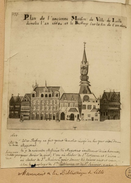 Lille : Hôtel de ville (reproduction d'un dessin du Ms 678, fol. 135, Bibliothèque municipale de Lille) Date : fin XIX siècle [1850/1899] Dimensions : 11,3 x 15,8 cm.